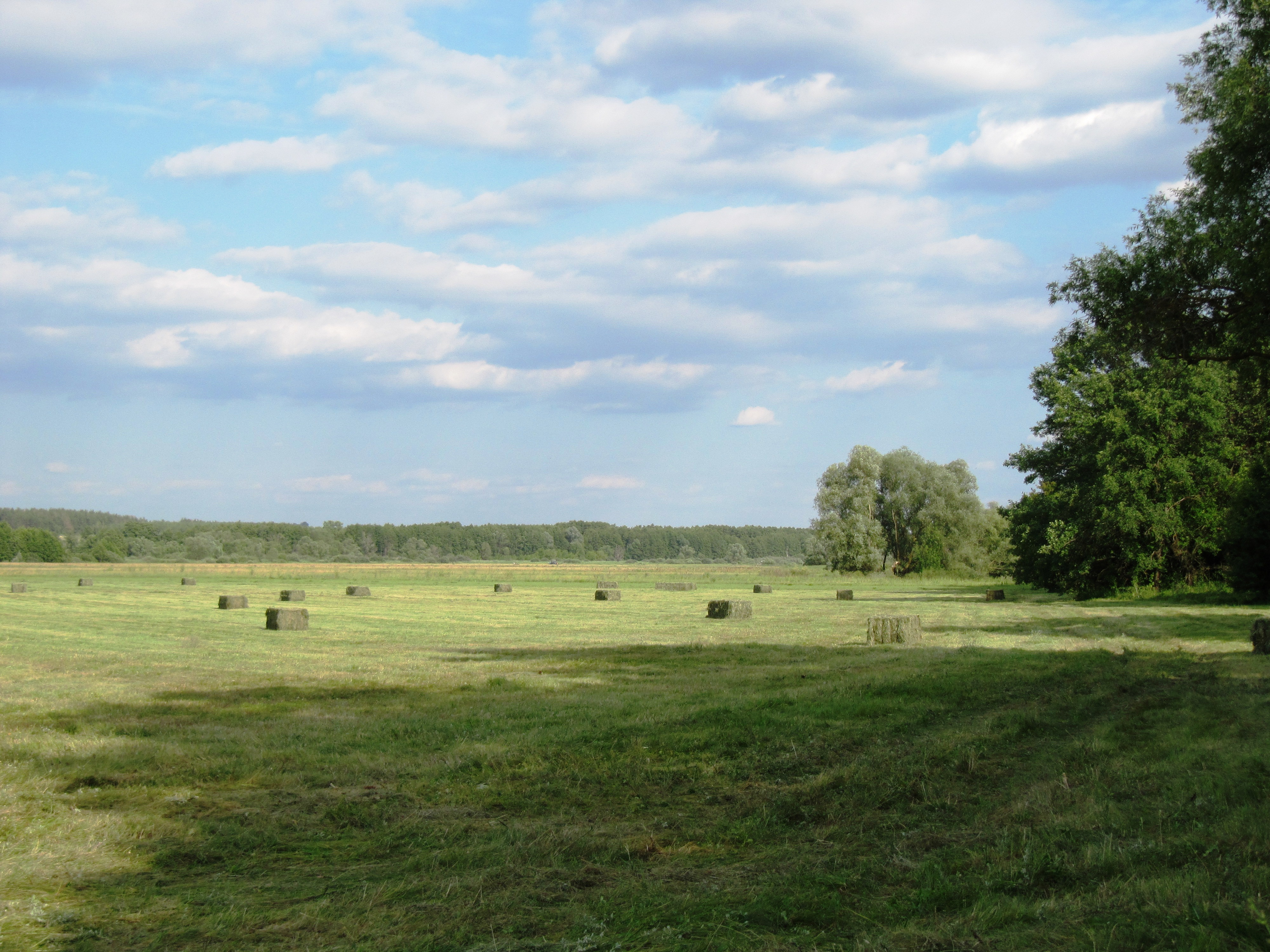 Заливной луг в пойме Дона. Павловский район.